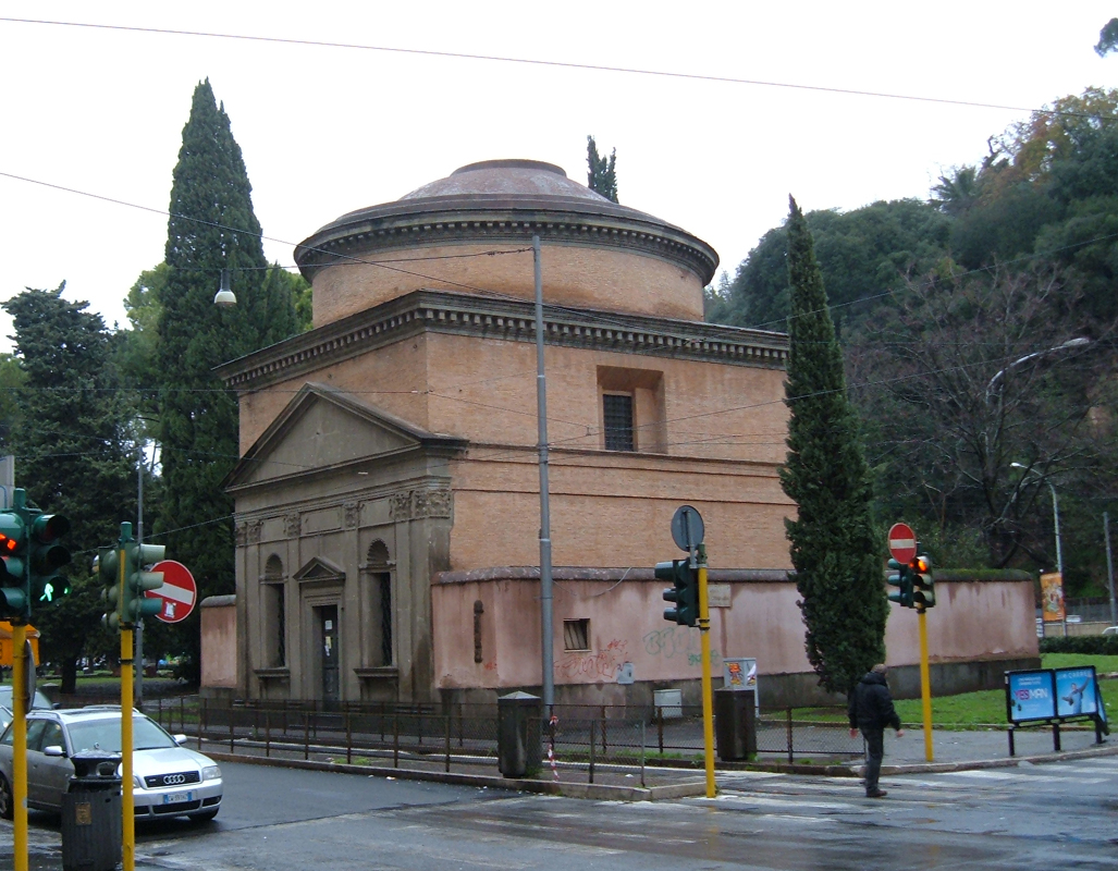 Chiesa di Sant'Andrea del Vignola, a Roma, nel quartiere Flaminio.